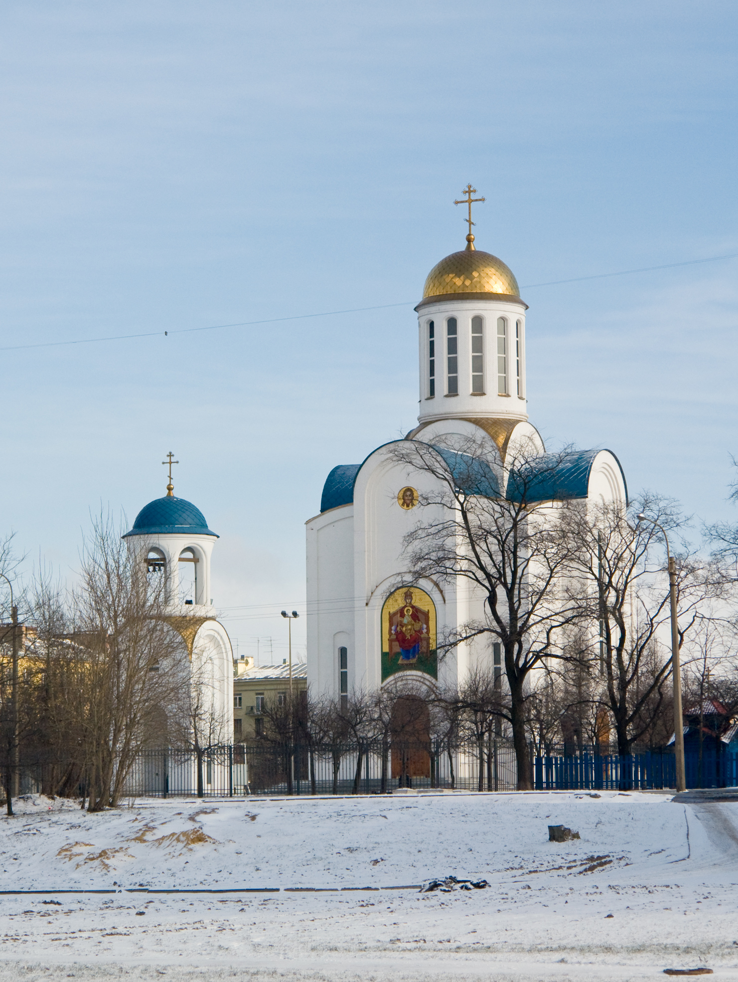 Храм Успения Пресвятой Богородицы (Санкт-Петербург)